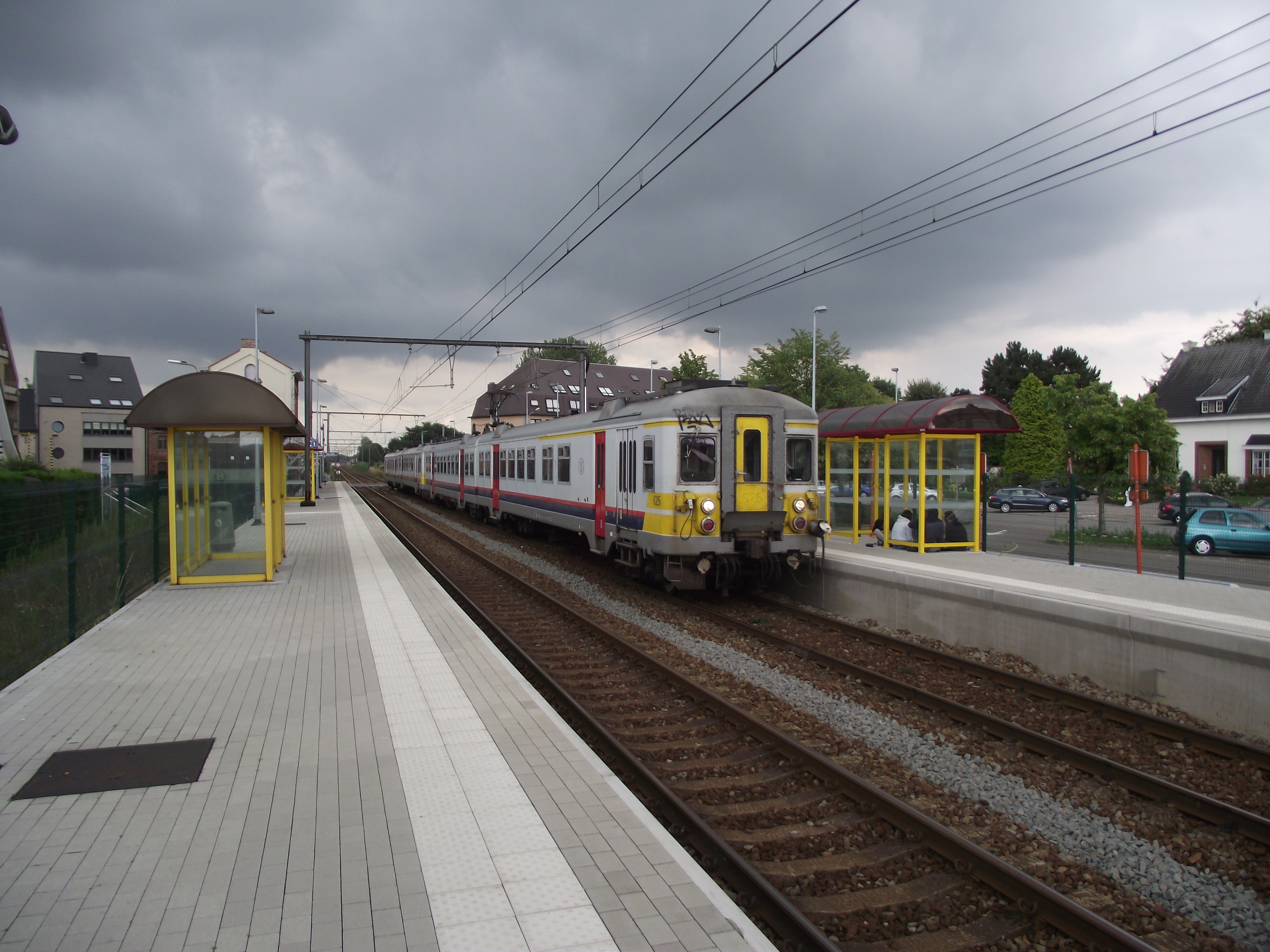 Binnenkomende trein in Herzele